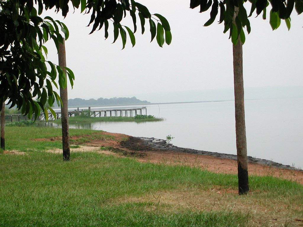 Lago Ypacarai